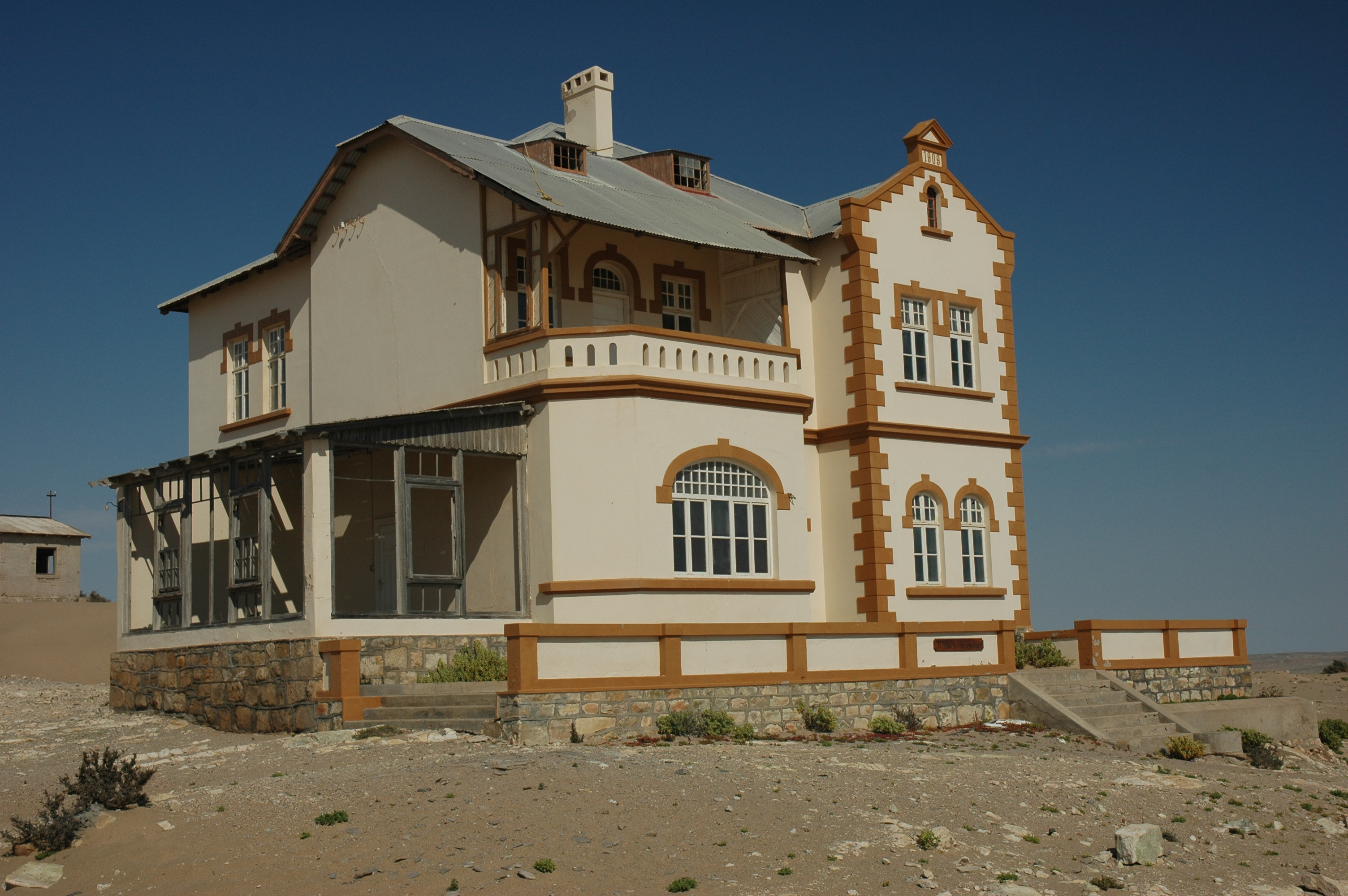 Namibie Kolmannskuppe Photographie prise par GIRAUD Patrick